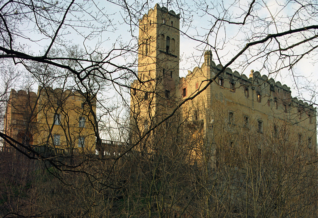 Schloss Niederrathen (Niederschlesien) (= Ratno Dolne, Polen)